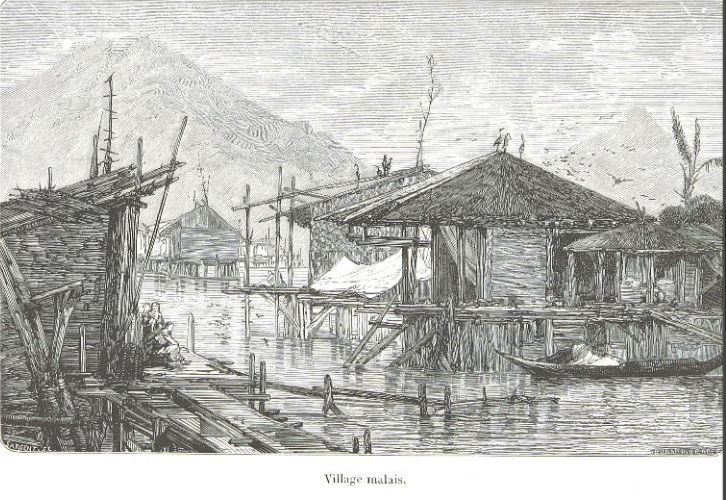 Arthur Mangin, Voyages et Découvertes outre-mer au XIXe siècle, illustrations par Durand-Brager, 1863 ː village malais.